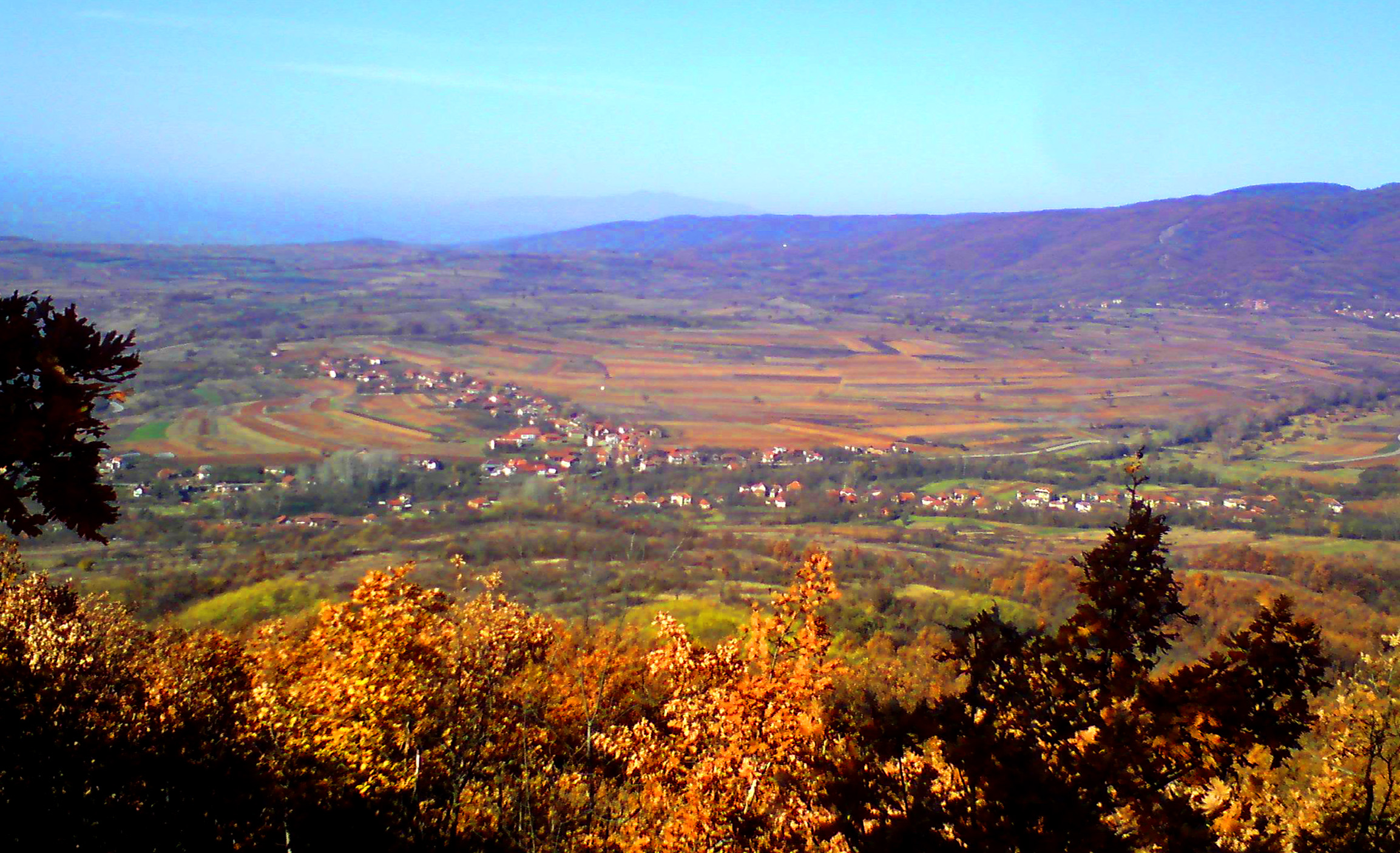 Панорама Доњег Барбеша Licensing